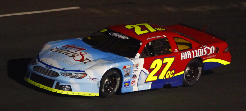 Alexandre Gingras - Photo Paul-Émile Poulin-Jacques